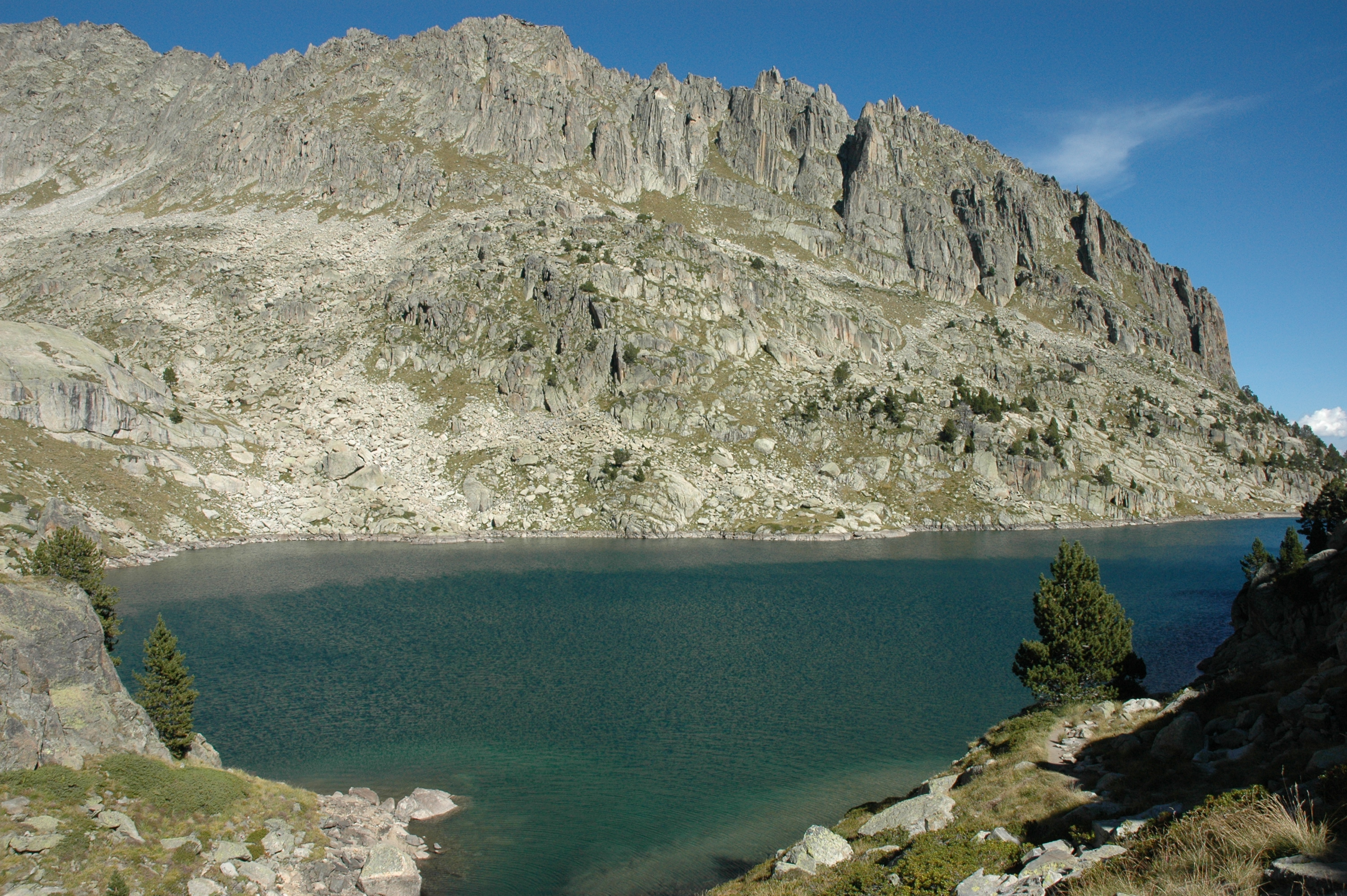 Estany Gran d'Amitges i cresta de Bassiero